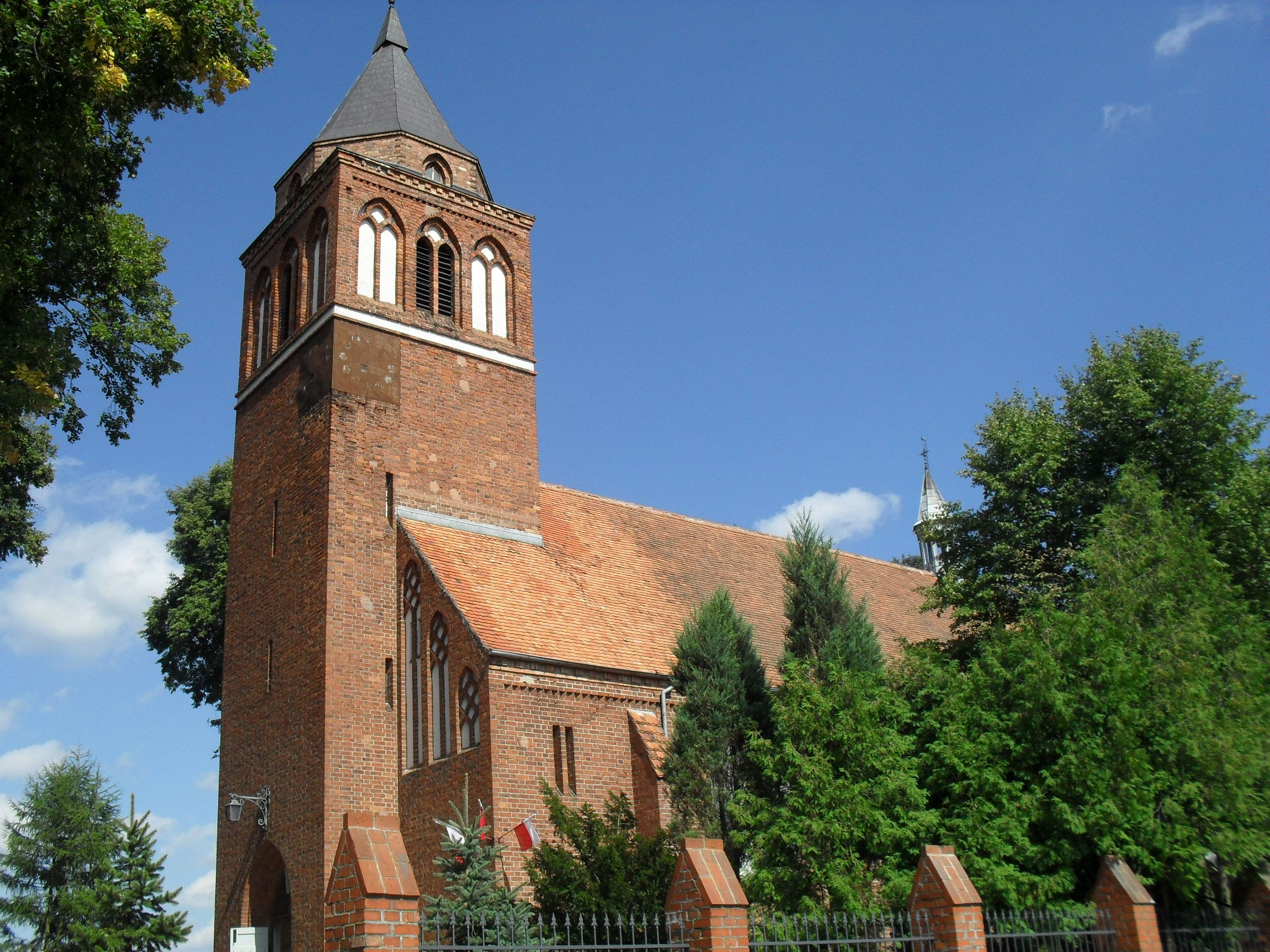 Kościół p.w. św. Marcina w Świekatowie